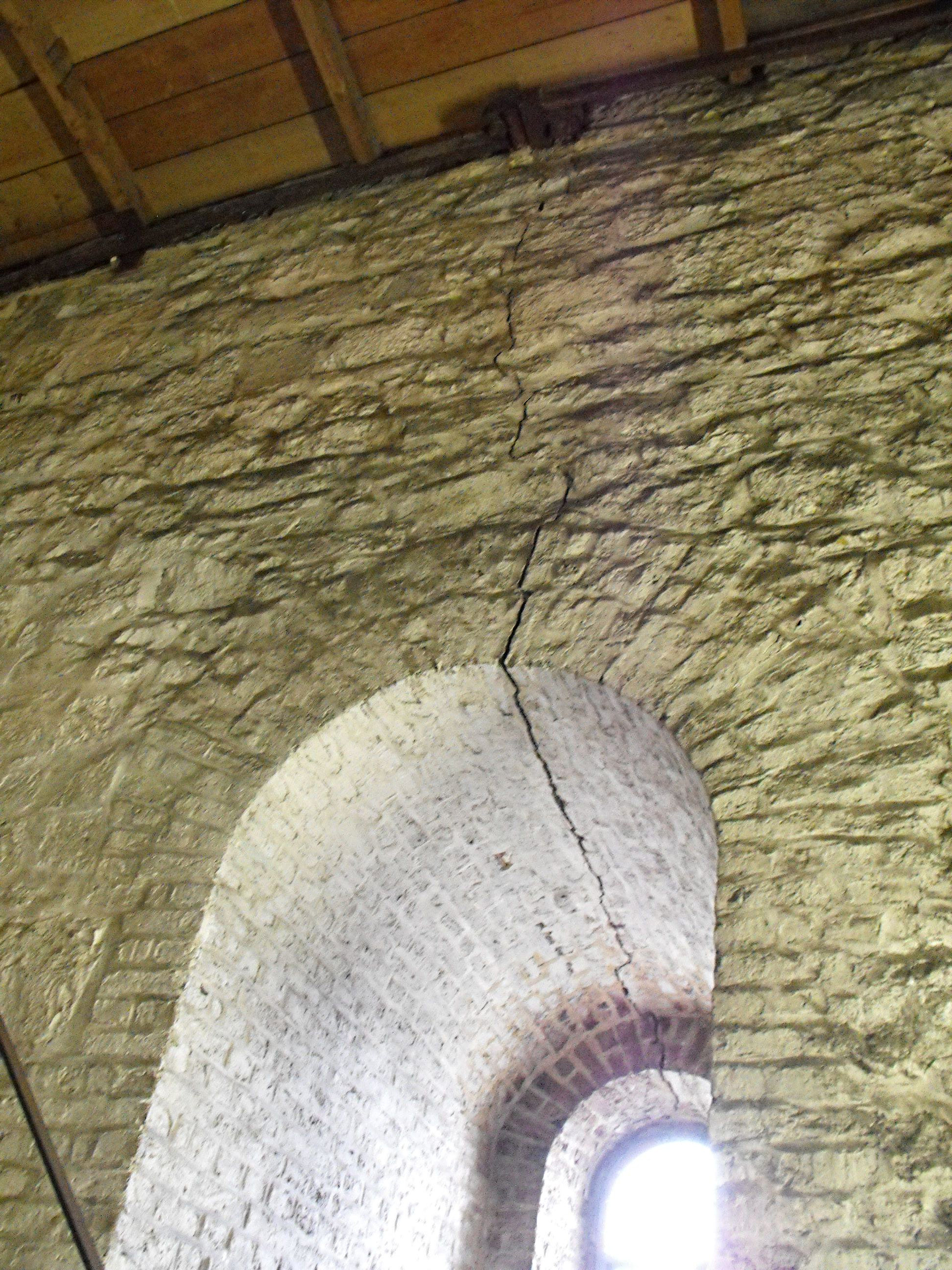 Setzungsriss im Kirchturm von St. Jakob (Aachen)